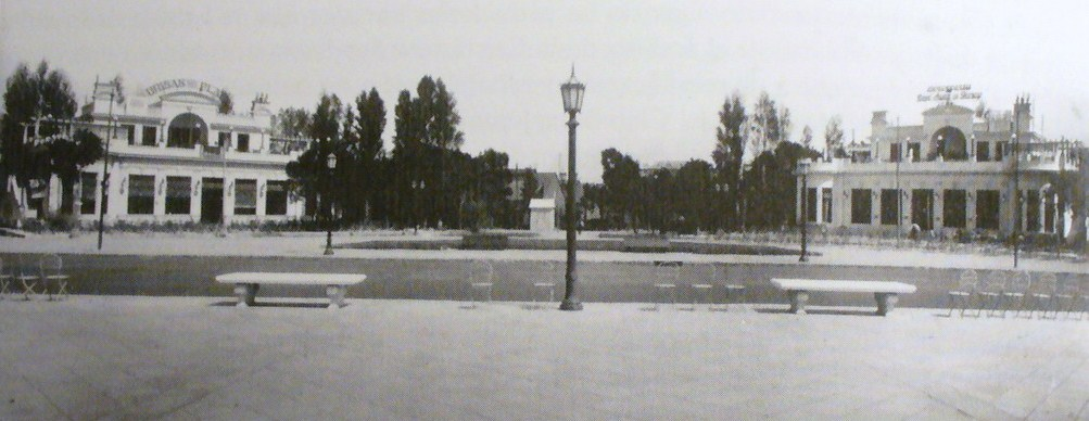 Edificios construidos para la Municipalidad de Buenos Aires en la Costanera Sur de Puerto Madero, por el arquitecto Andrés Kalnay en 1928. Uno fue alquilado a la Cervecería Brisas del Plata y el otro a la Don Juan de Garay. En la actualidad, sólo sobrevive Brisas del Plata, transformada en salón de eventos.